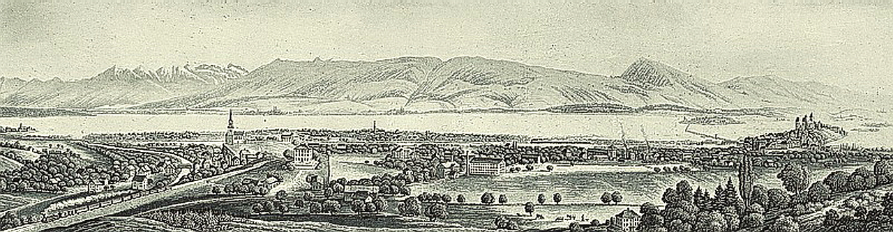 Rapperswil (SG) : Eisenbahnfieber 1859, Panoramabild aus der zweiten Hälfte des 19. Jahrhunderts. Bild aus Jona, Die Geschichte.